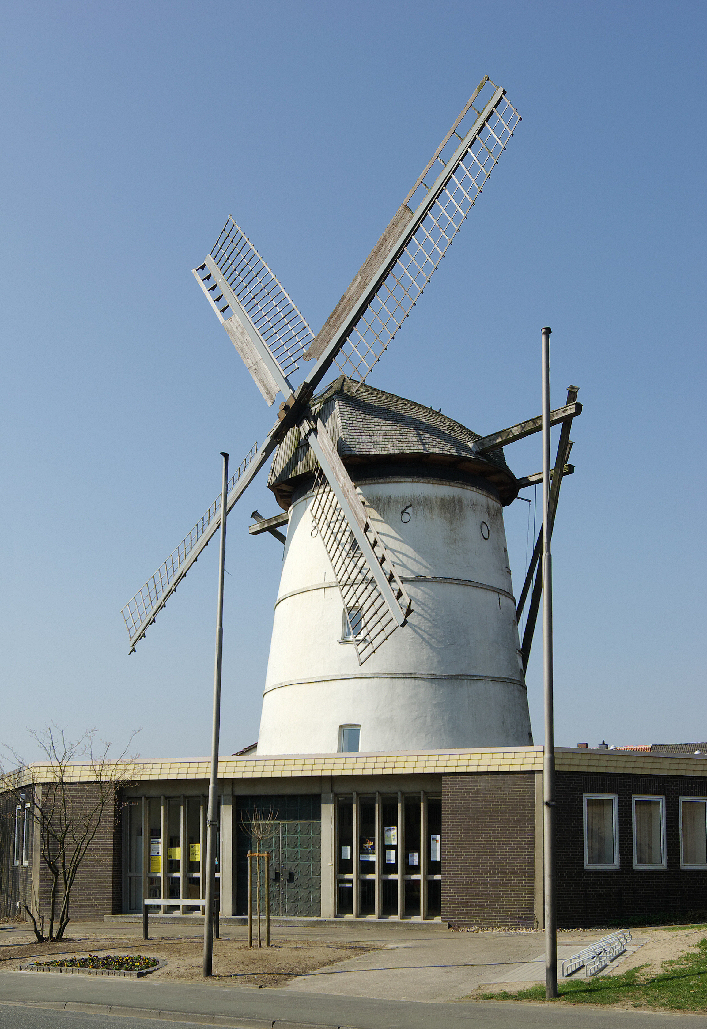 Alte Mühle in Bönen, Nordrhein-Westfalen, heute Kulturzentrum